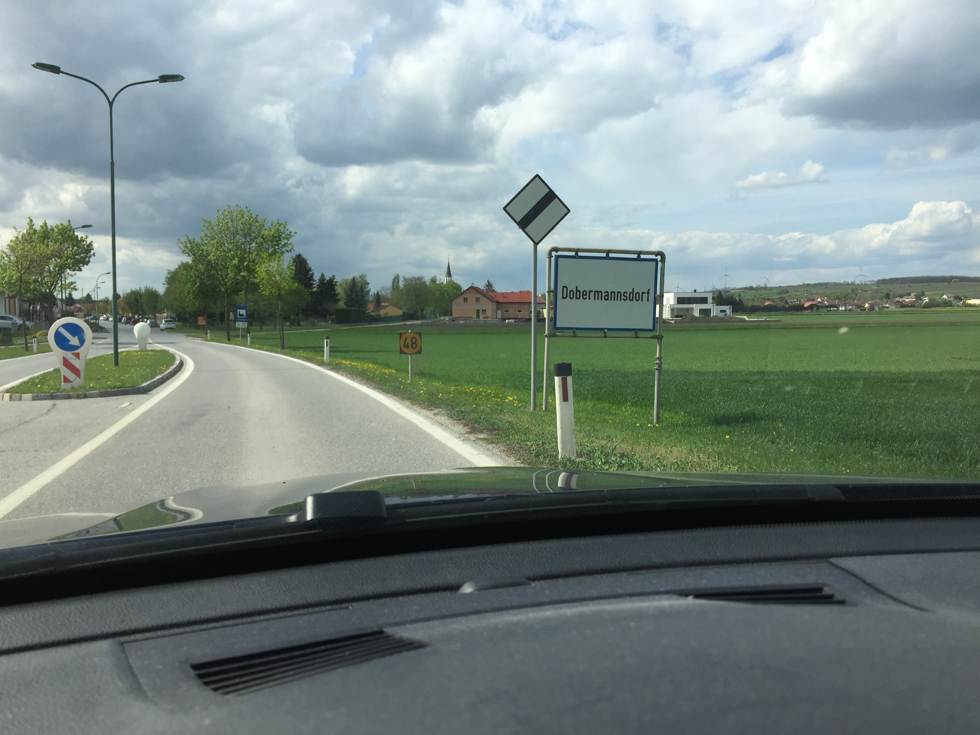 Aus der Bundesstraße mit Vorrang wird bei Ortsbeginn eine Straße ohne Vorrang. Nach Ortsende wird die Straße wieder als Vorrangstraße ausgeschildert.